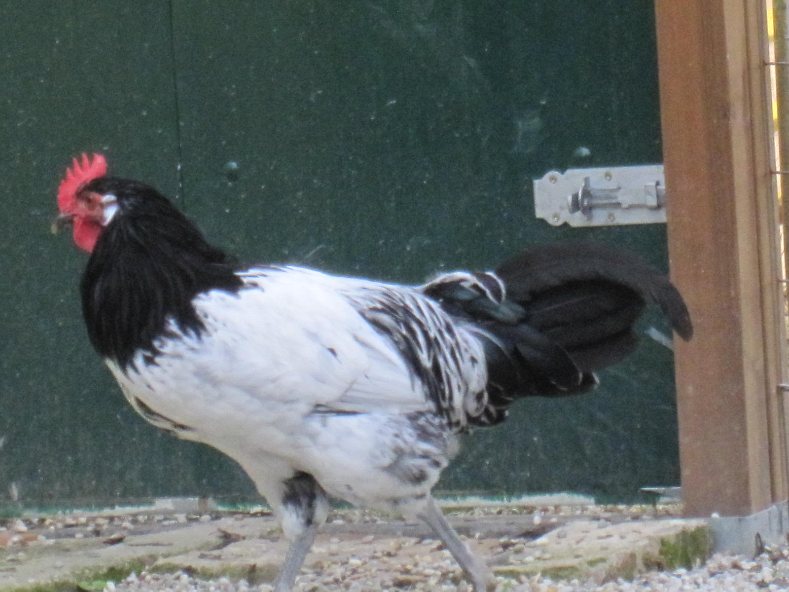 Lakenfelder Hahn (Jungtier)